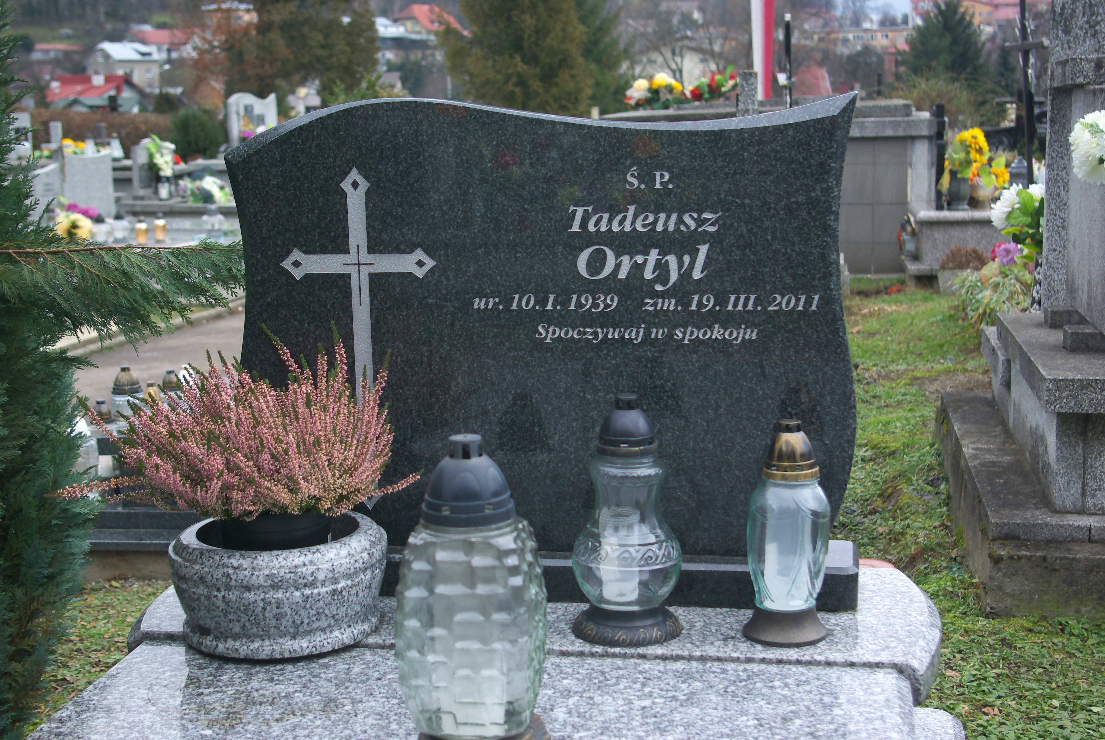 Nagrobek Tadeusza Ortyla na Cmentarzu Centralnym w Sanoku.